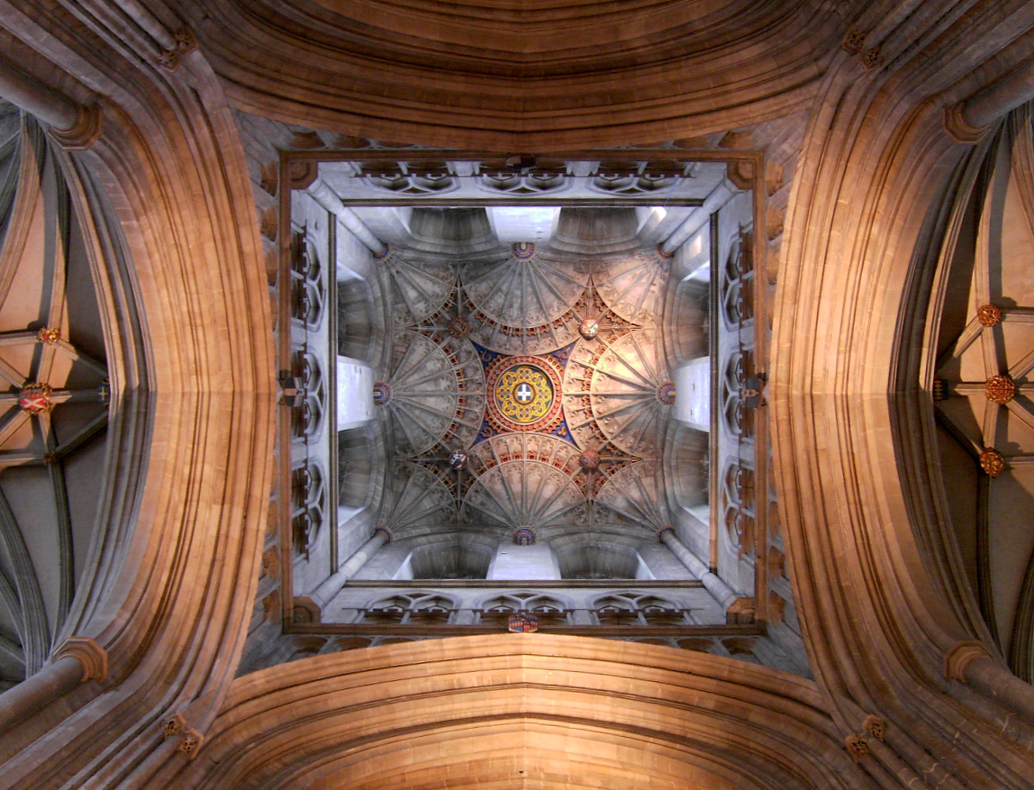 Kathedrale von Canterbury, Blick in die Vierung